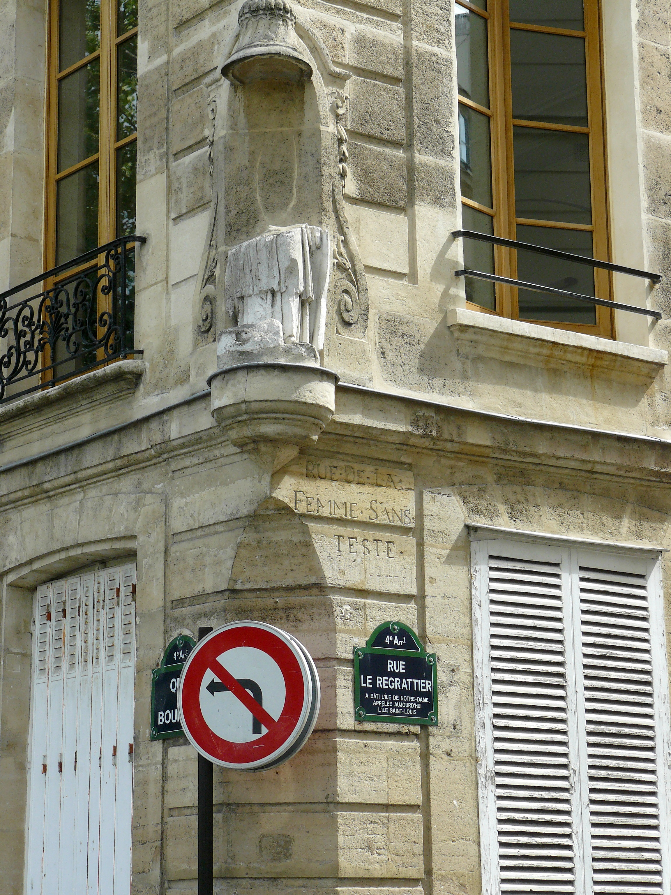 Angle de la rue Regrattier et du quai Bourbon, île Saint-Louis, Paris 4e arrondissement. La statue, endommagée volontairement en 1793 représente Saint Nicolas. L'ancien nom de la rue Le Regrattier, Rue de la Femme Sans Teste est encore visible.